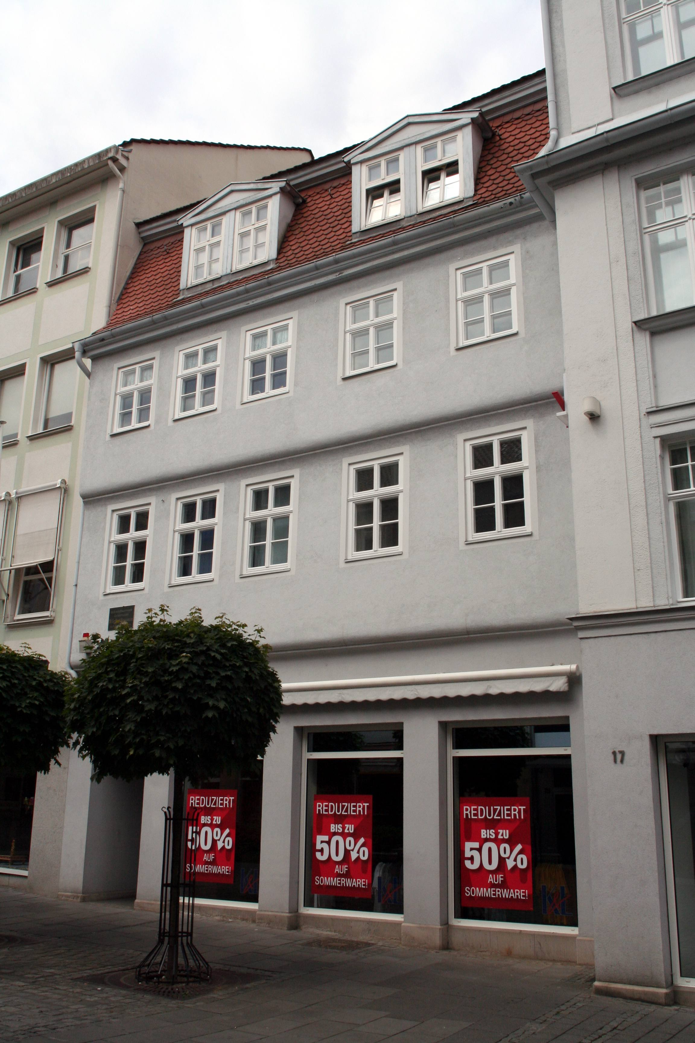 Steinweg 15 in Coburg